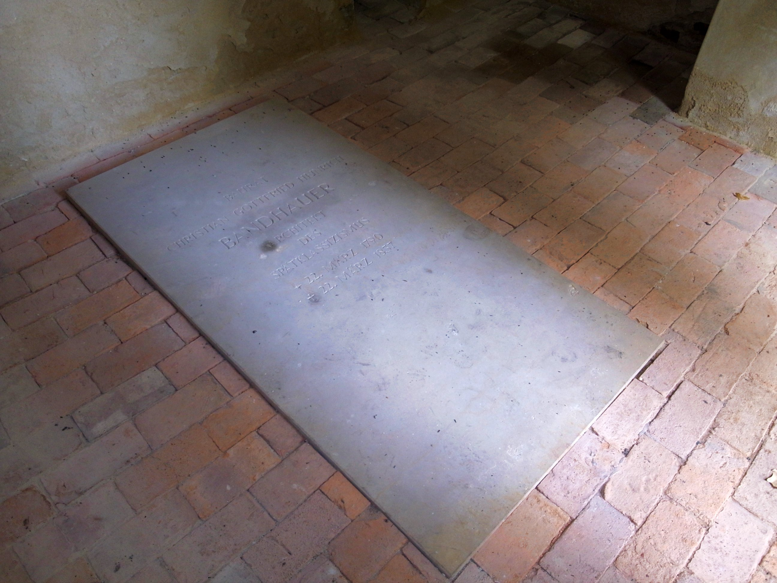 Gottfried Bandhauer,Grabplatte auf dem Roßlauer Friedhof